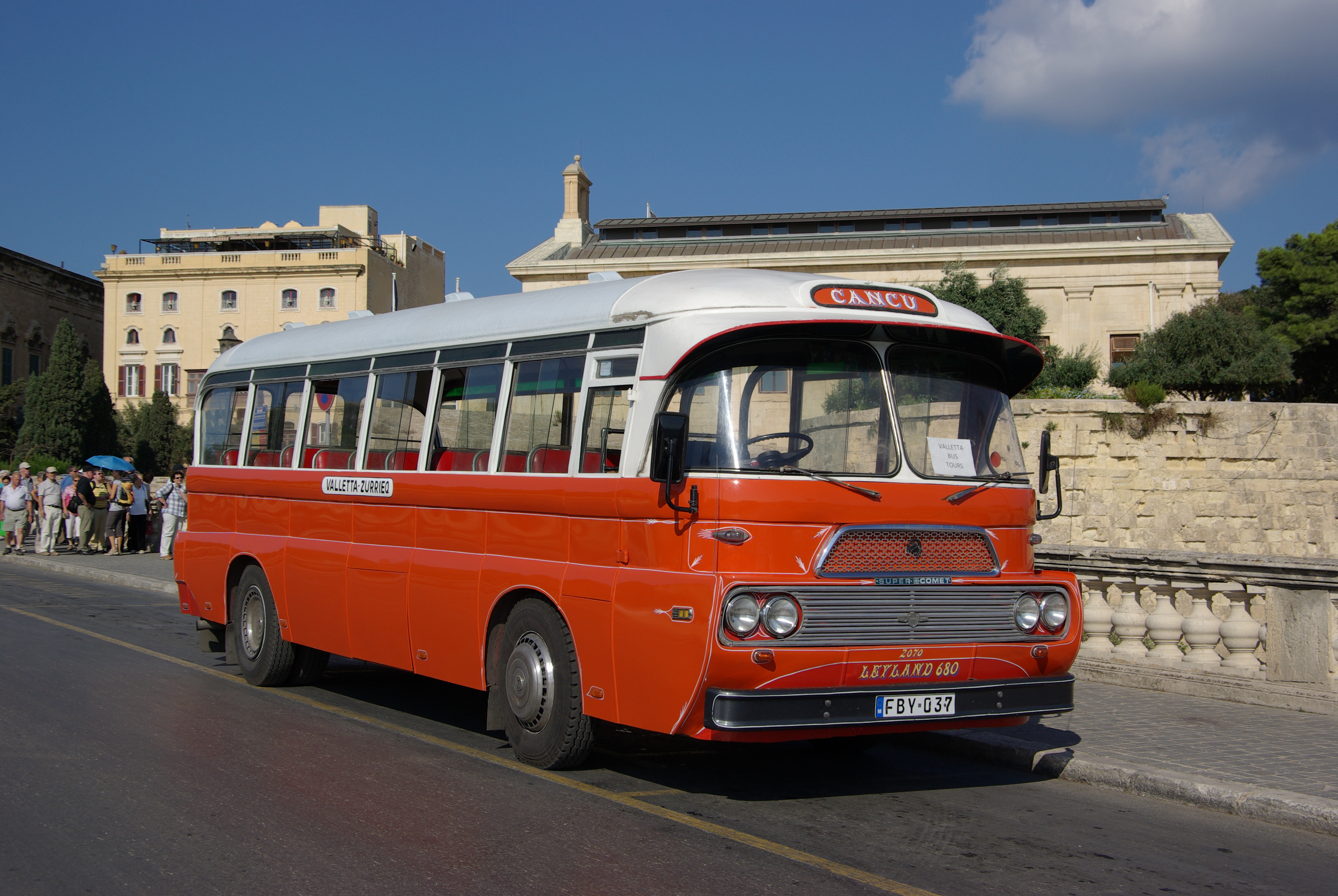 Einer der Oldtimer Busse von Malta